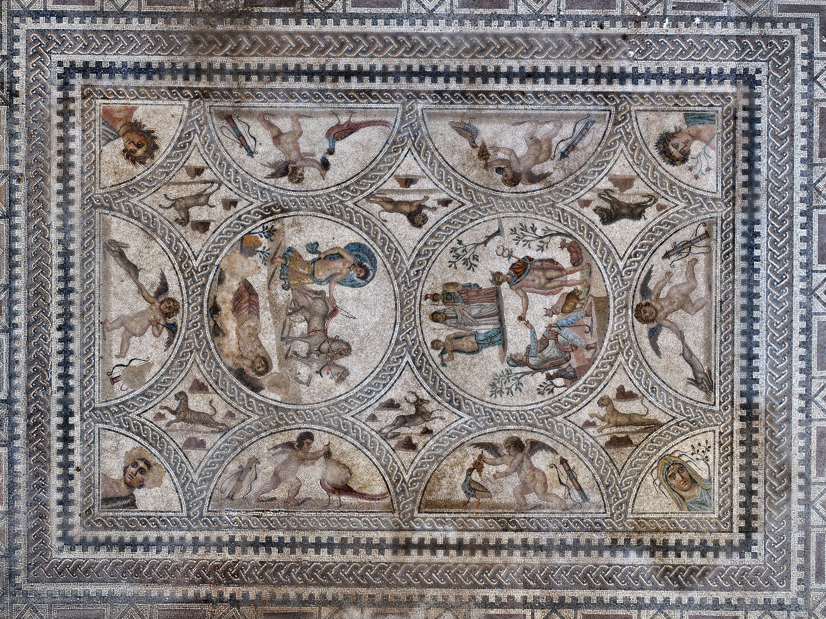 Mosaico de los Amores, en Cástulo (Linares, Jaén).